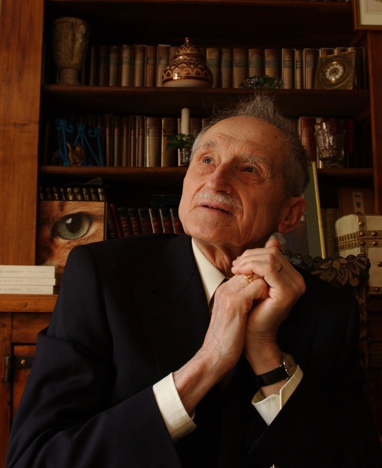 Lucien Jerphagnon à son bureau.